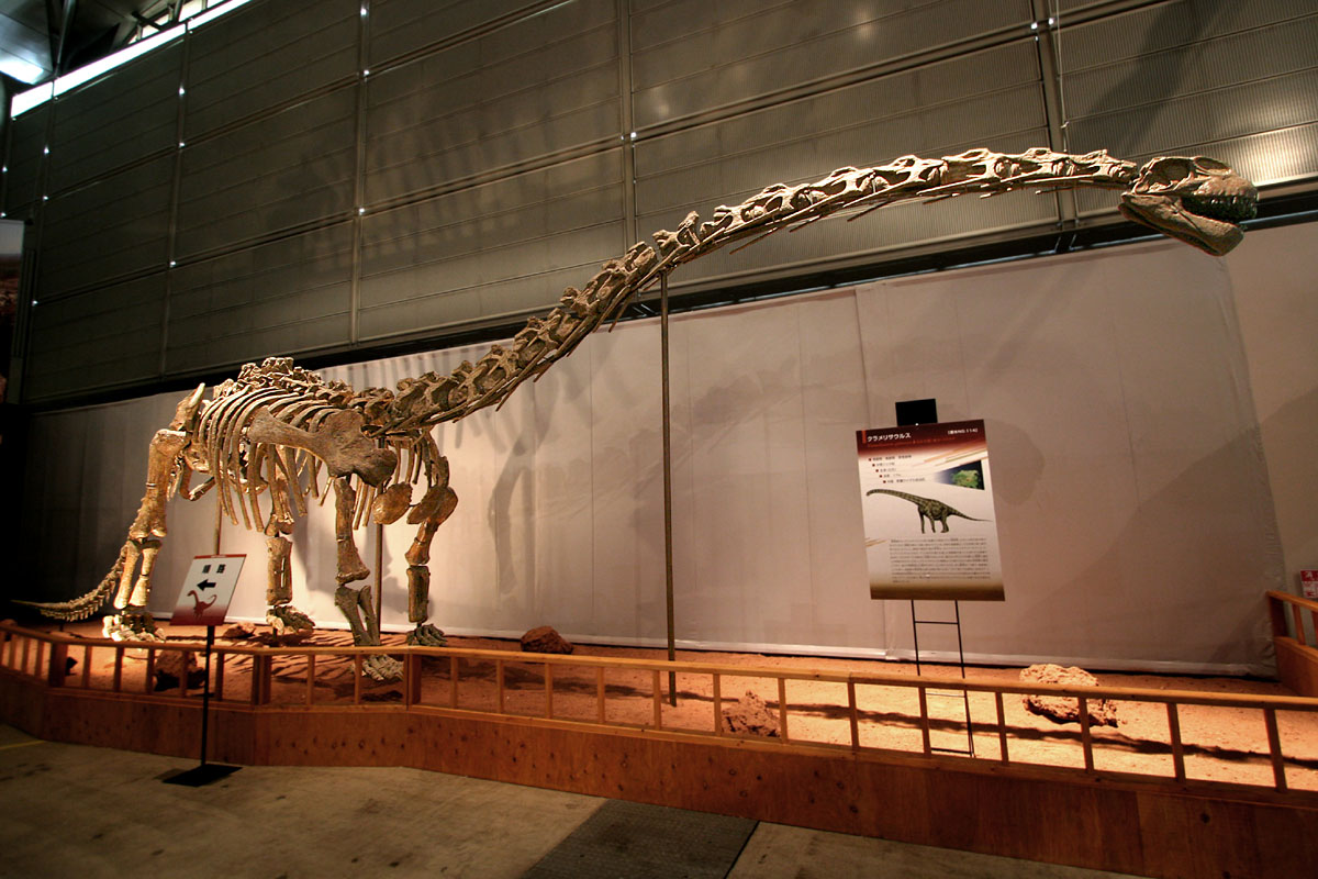 Klamelisaurus - 01